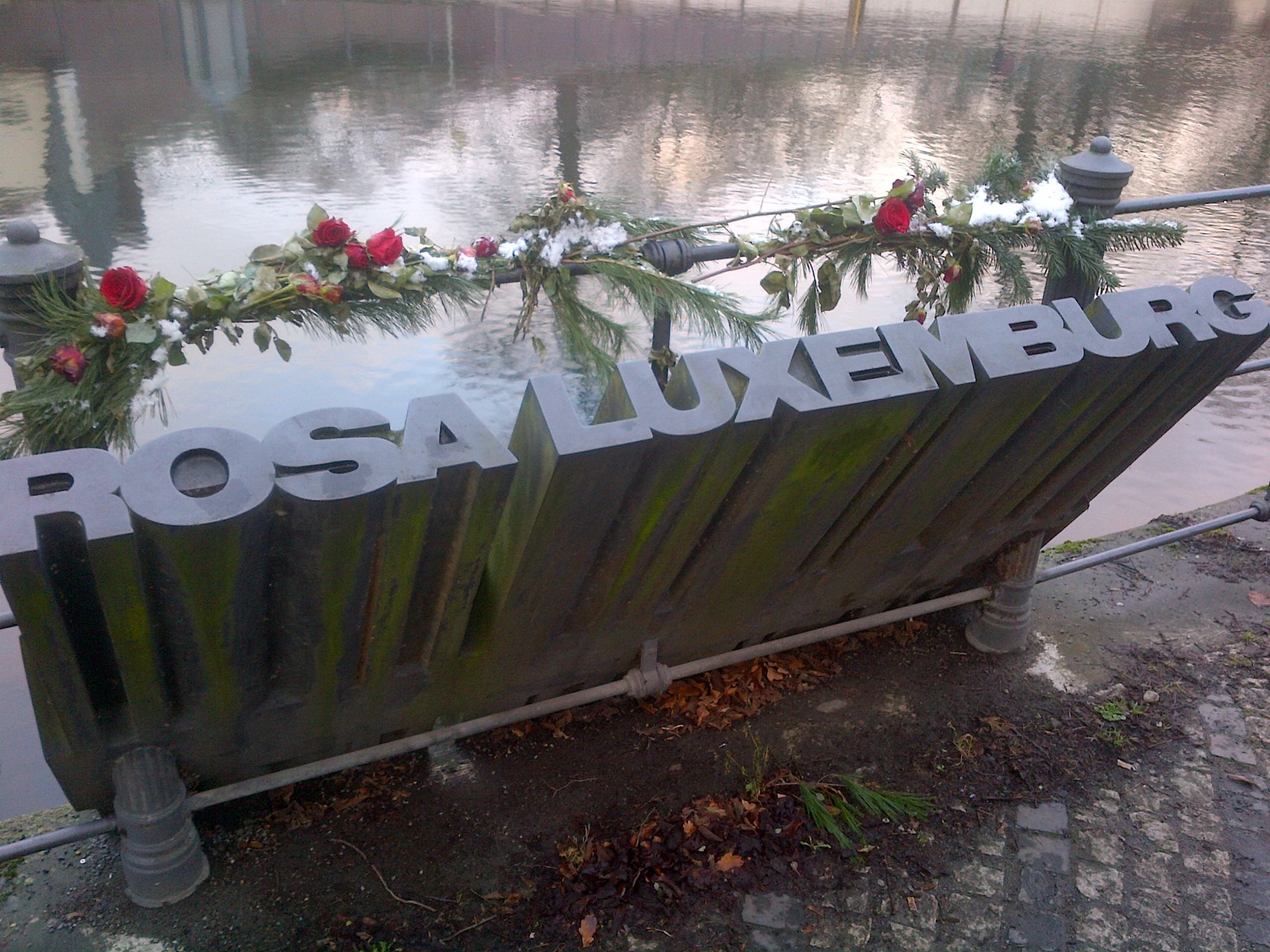 Srpskohrvatski / српскохрватски: Spomenik u Tiergartenu u Berlinu